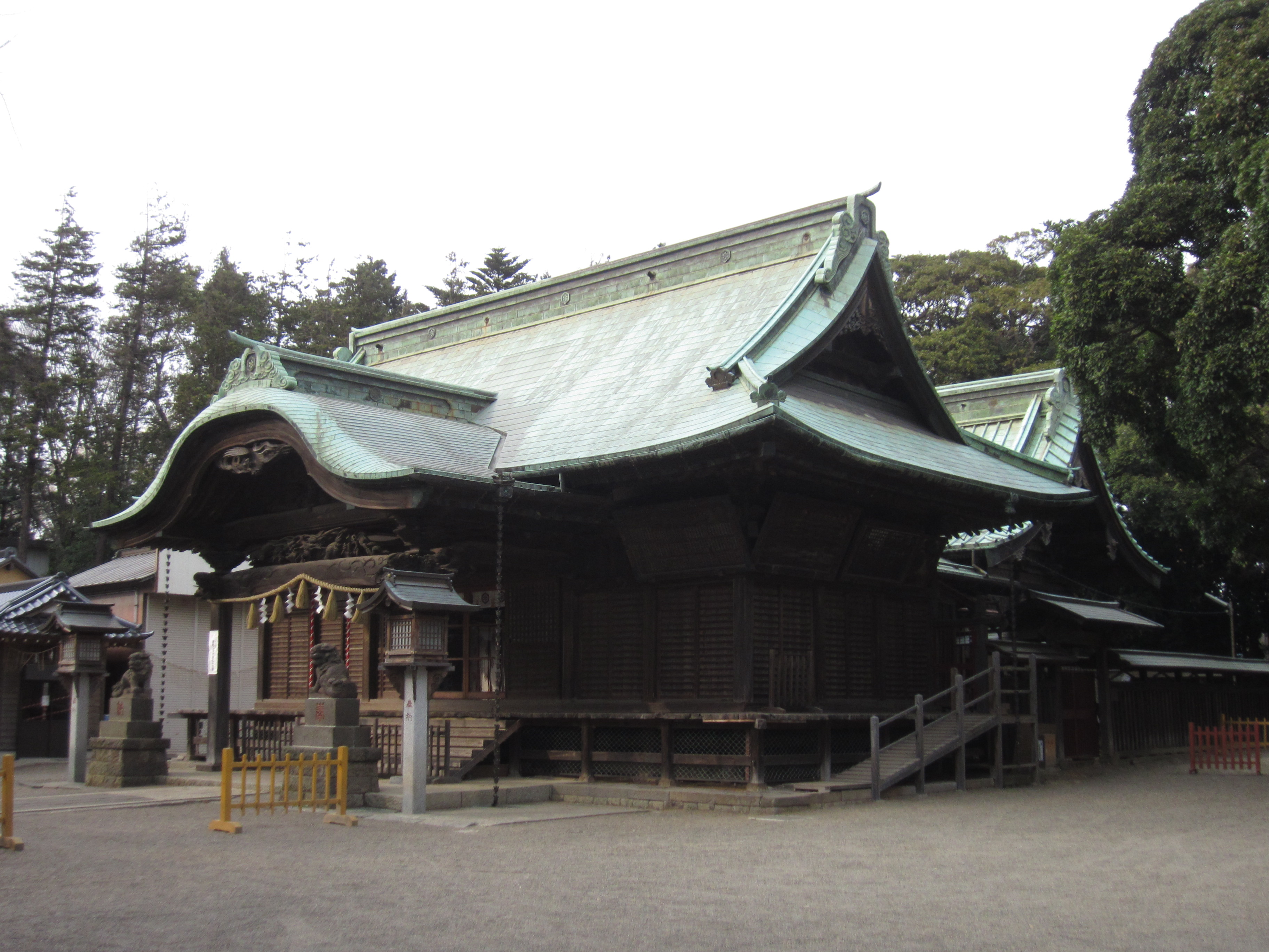 二宮神社 (船橋市) 社殿